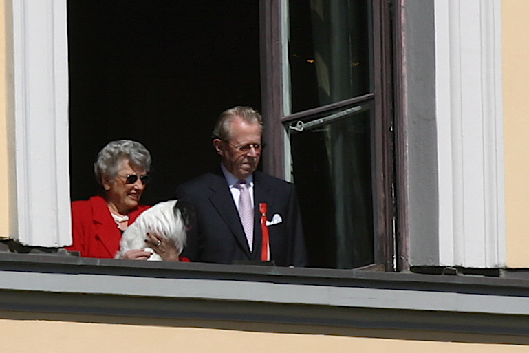 Prinsesse Astrid fru Ferner og Johan Martin Ferner – og hunden i vindauge på Slottet 17. mai 2007